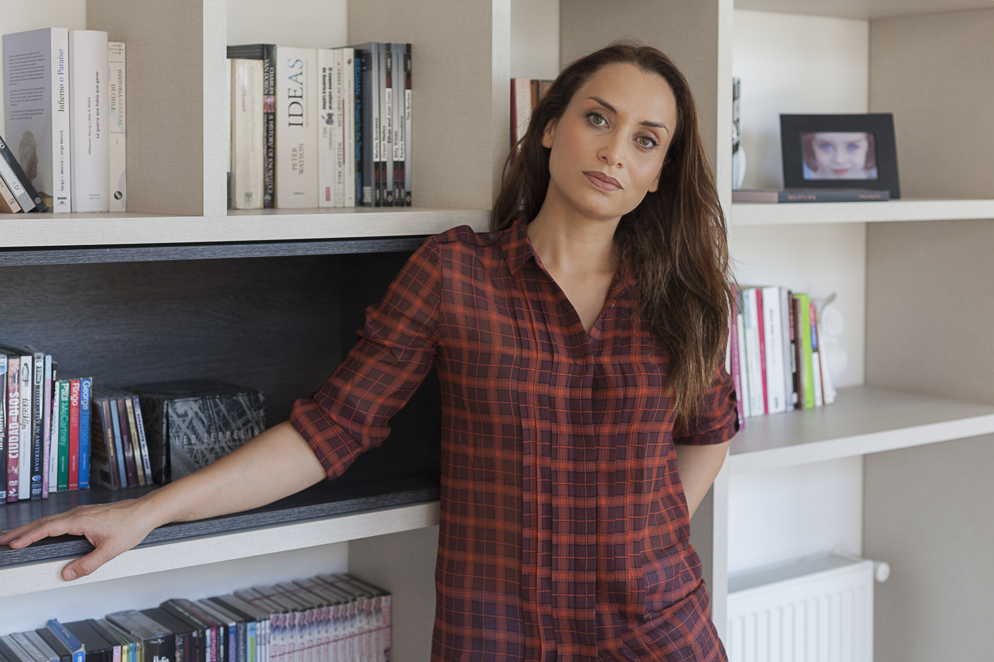 Coca Gómez